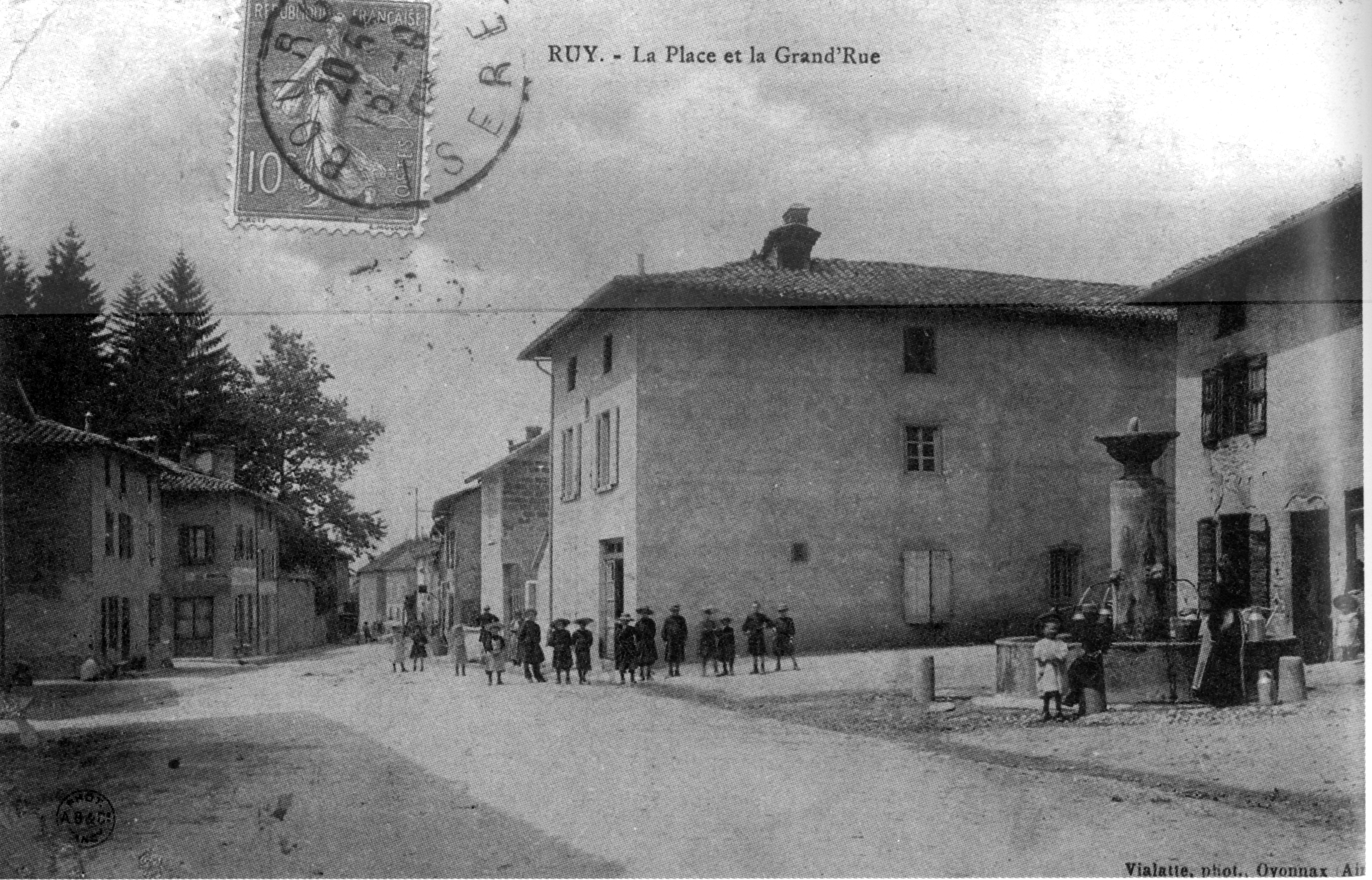 Ruy, la place et la Grand'Rue en 1907